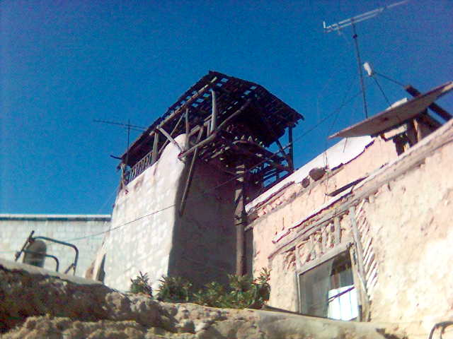 Al Jazari Noria General View